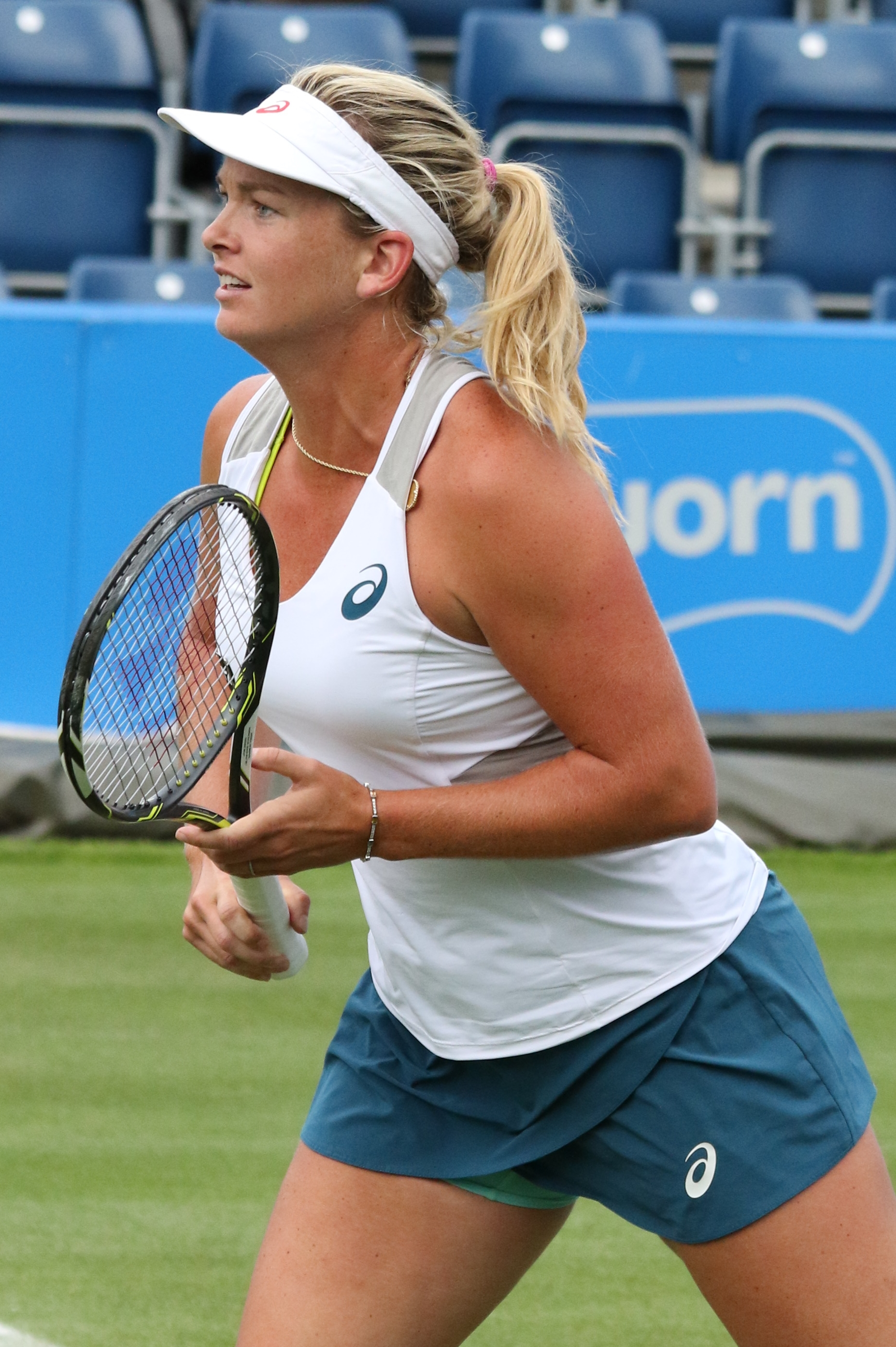 Vandeweghe BM16 (24)